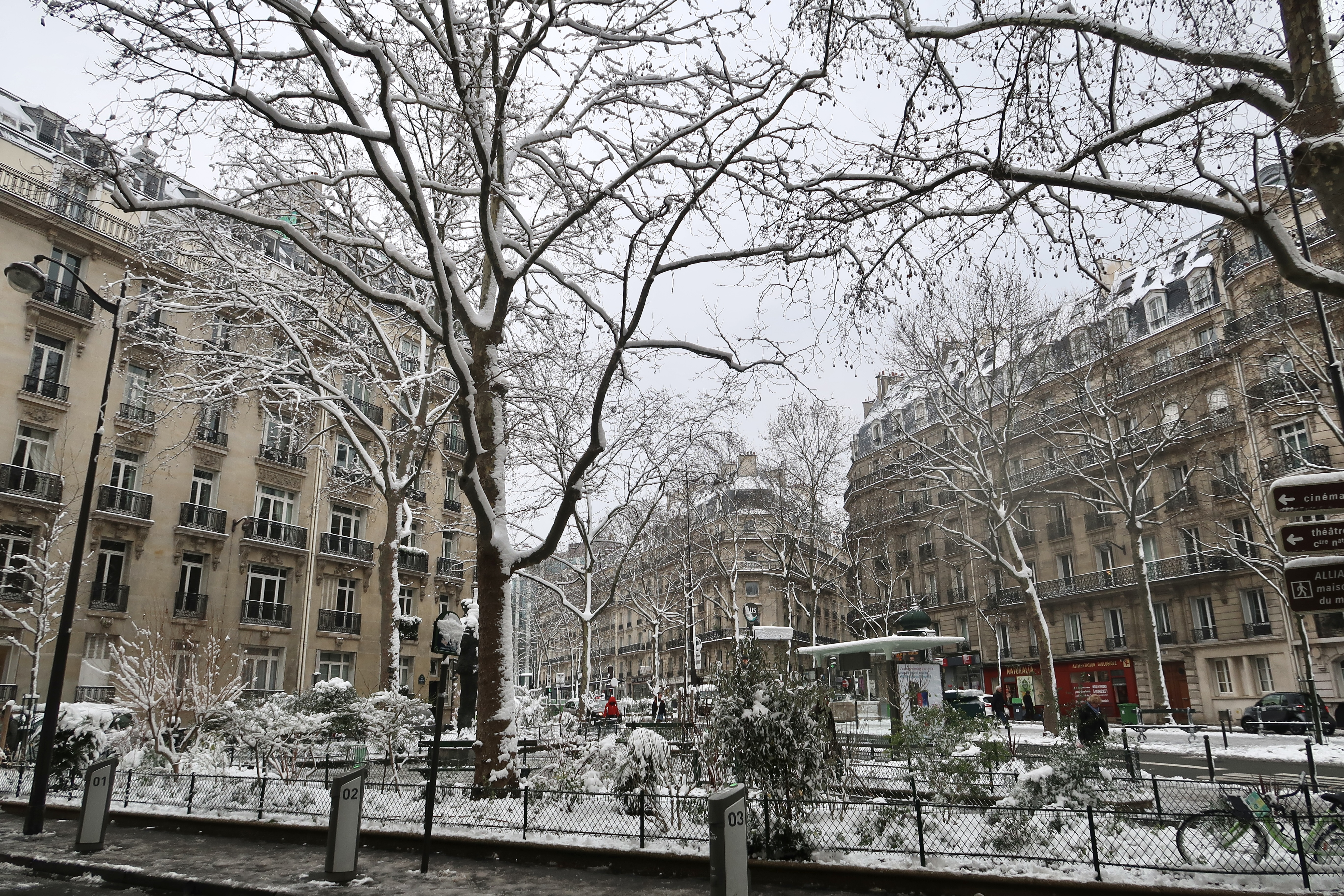 Square au croisement des rues Notre-Dame-des-Champs et Stanislas et du boulevard Raspail : place Pierre-Lafue (Paris, 6e) sous la neige (février 2018).